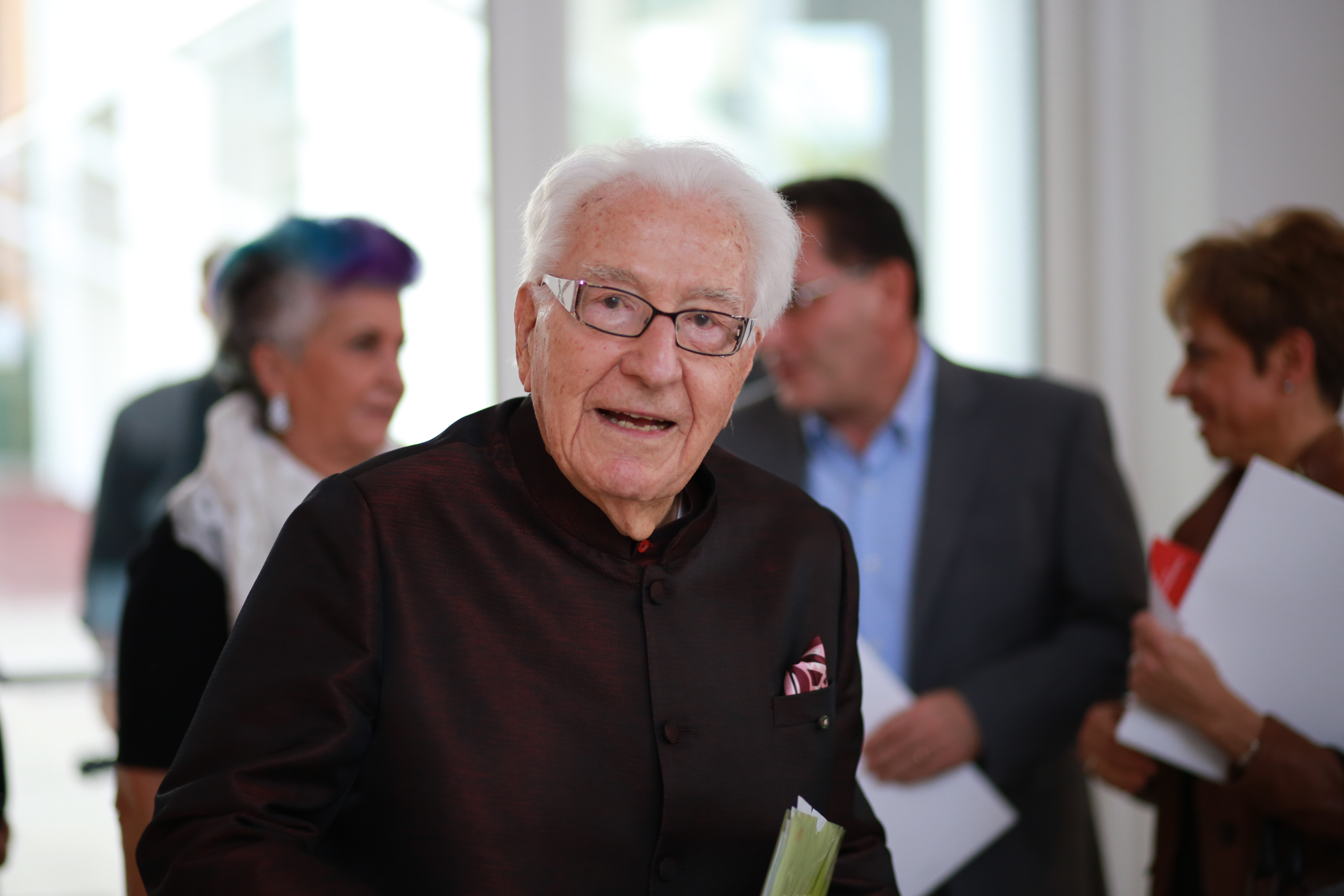 Marino Golinelli